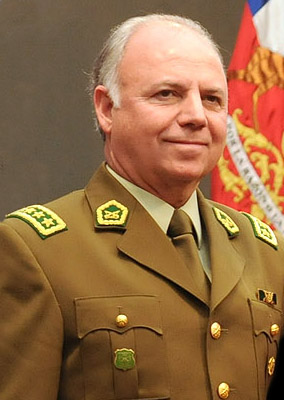 Eduardo Gregorio Gordon Valcárcel (Santiago, 9 de marzo de 1952). General Director de Carabineros de Chile